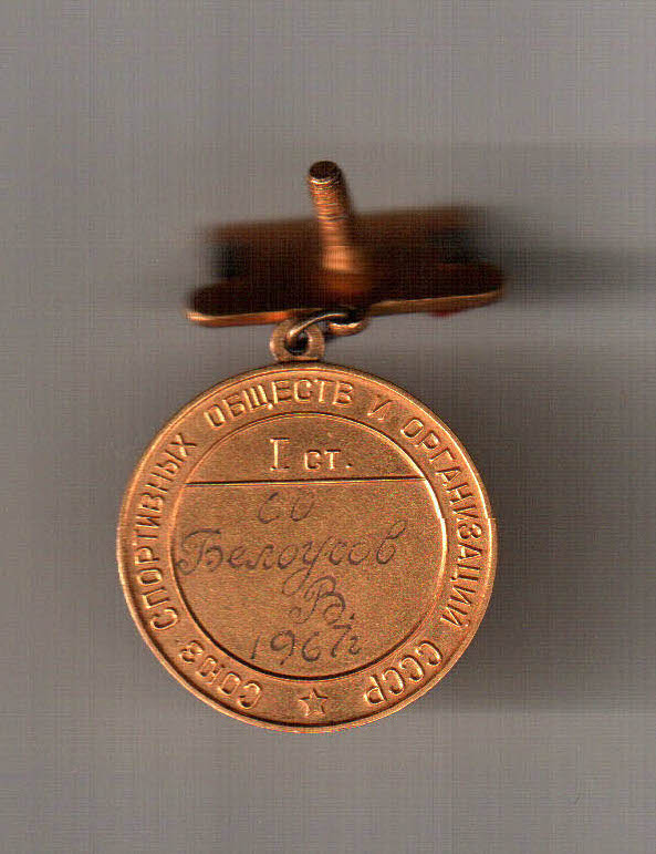 Медаль за первое место в чемпионате СССР по боксу. Белоусов Валерий Павлович.